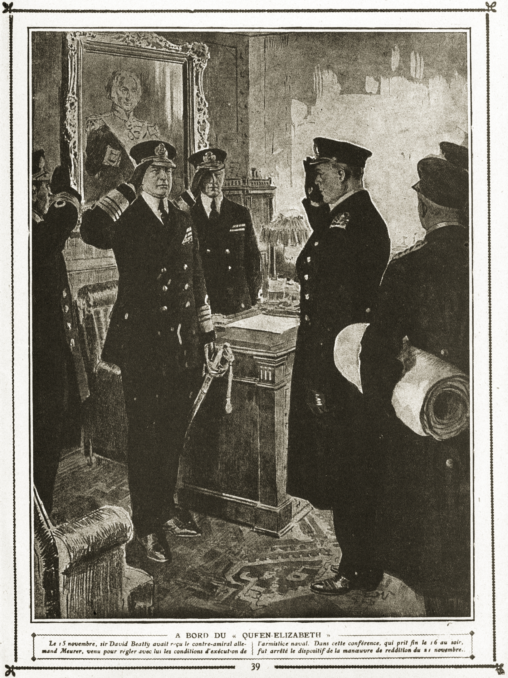 dans le salon_à_bord_du_Queen_Elizabeth, l'amiral Beatty reçoit_Meurer_qui négocie les conditions de redition de la flotte allemande en 1918.